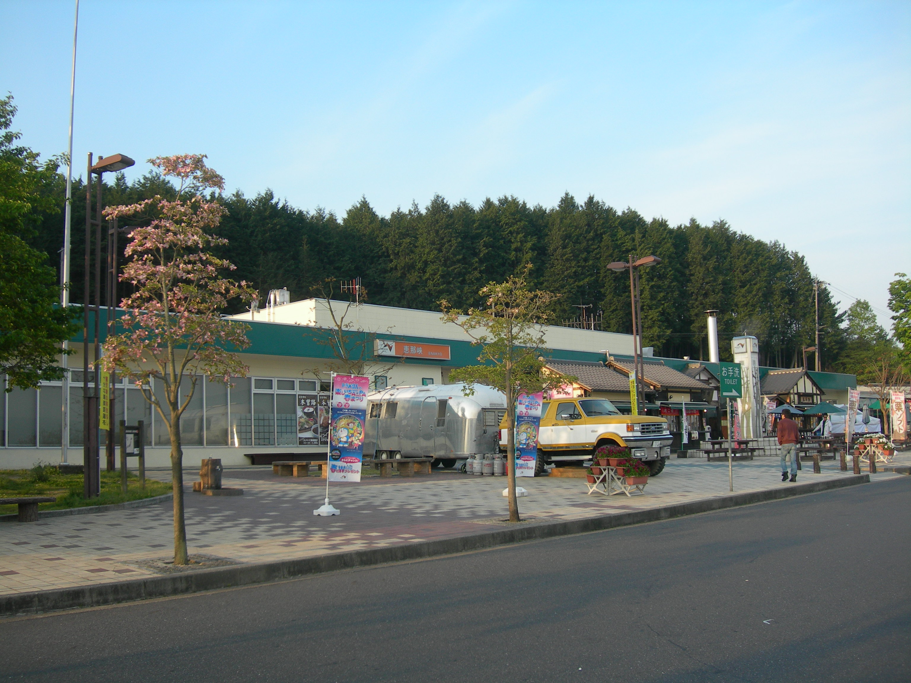 恵那峡サービスエリア 下り線施設